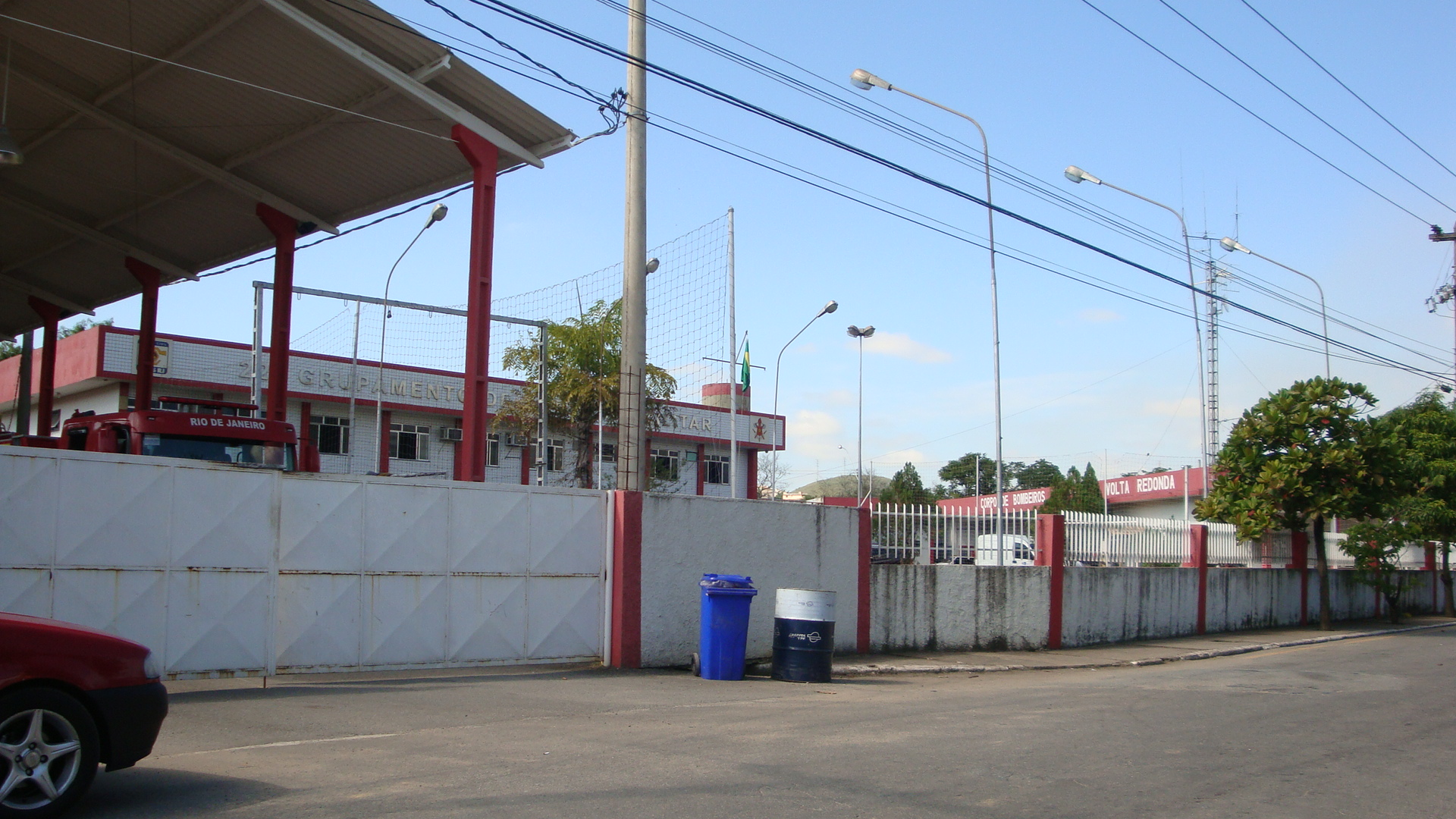 Corpo de Bombeiros de Volta Redonda